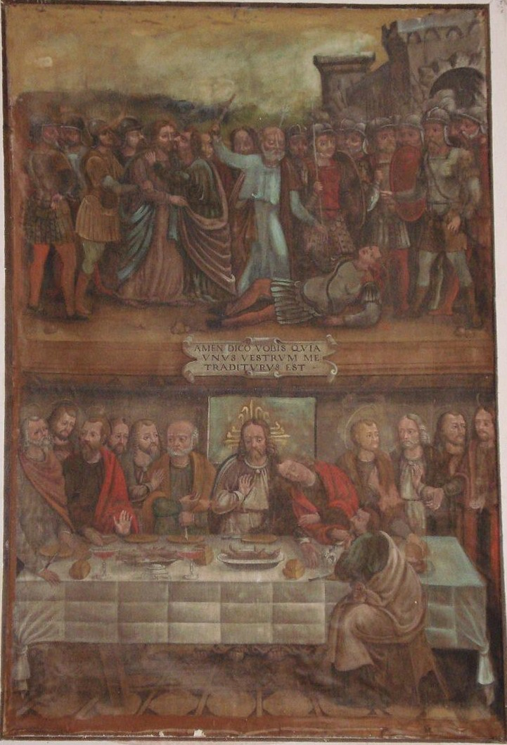 Albosaggia, S. Ciriaco, tela del Valloni - Foto Romeri M.